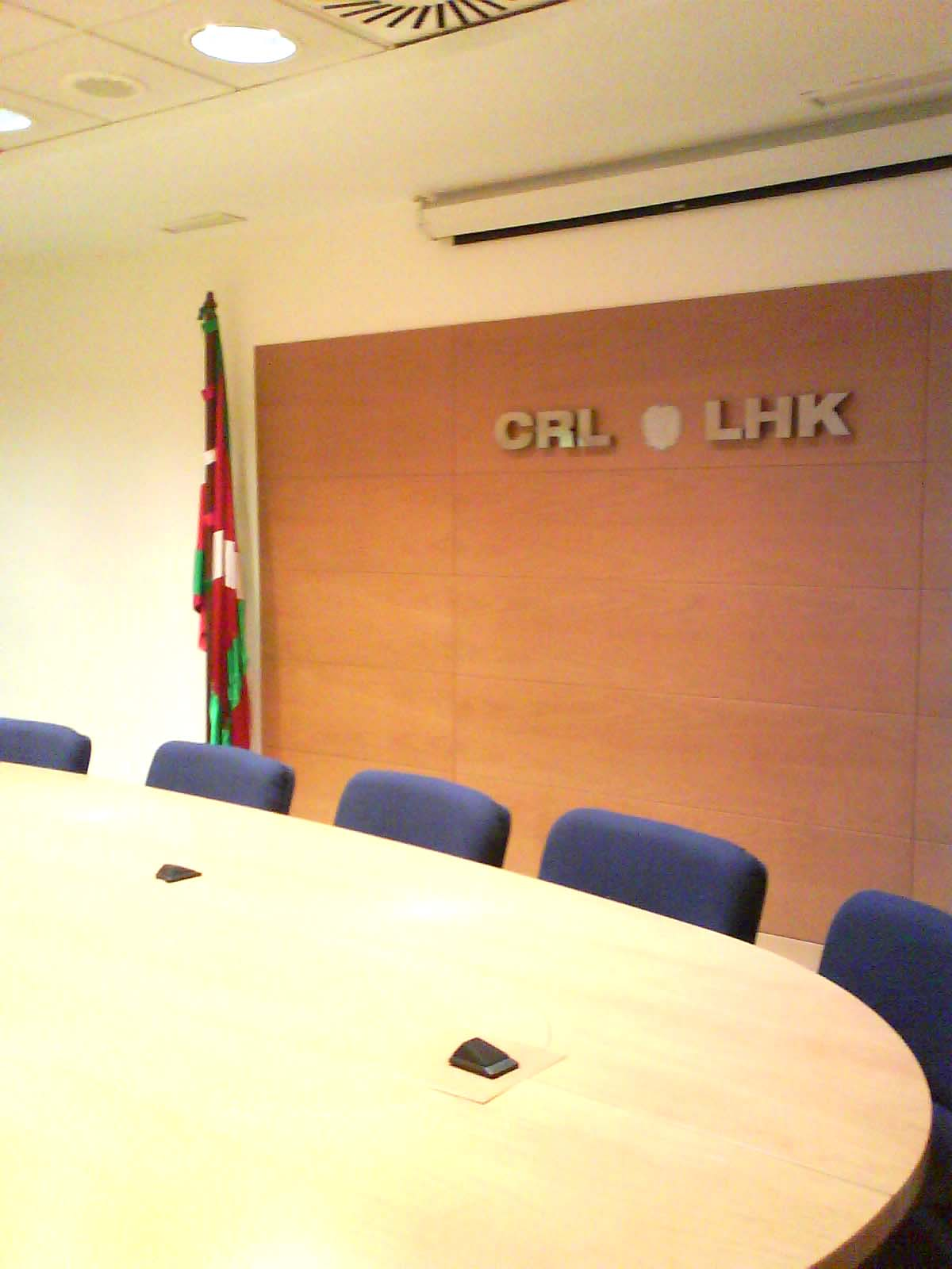 Sala de reuniones de las instalaciones del CRL en Bilbao.